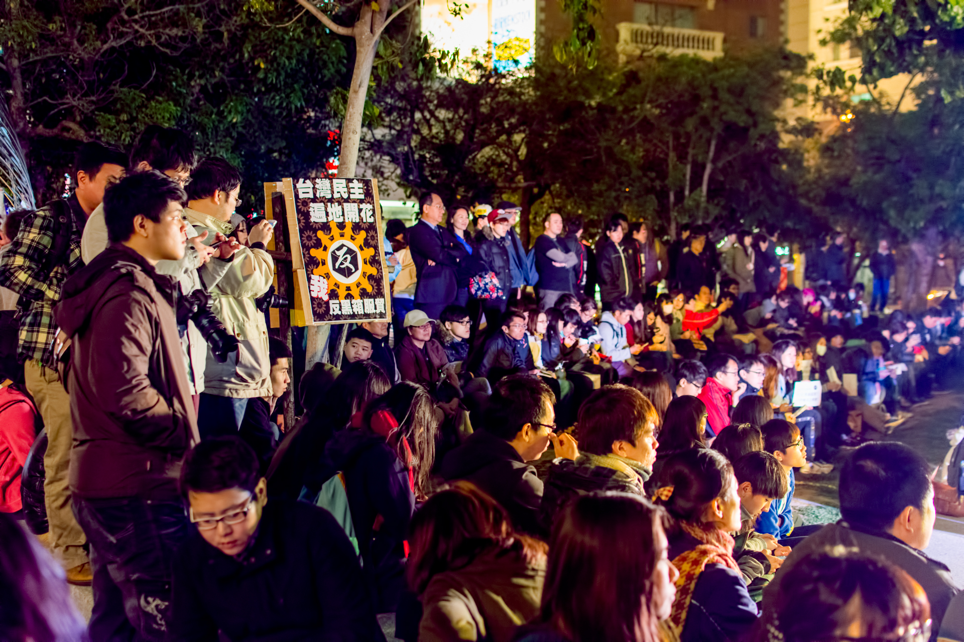 中文（台灣）: 反黑箱服貿-台中市民廣場。